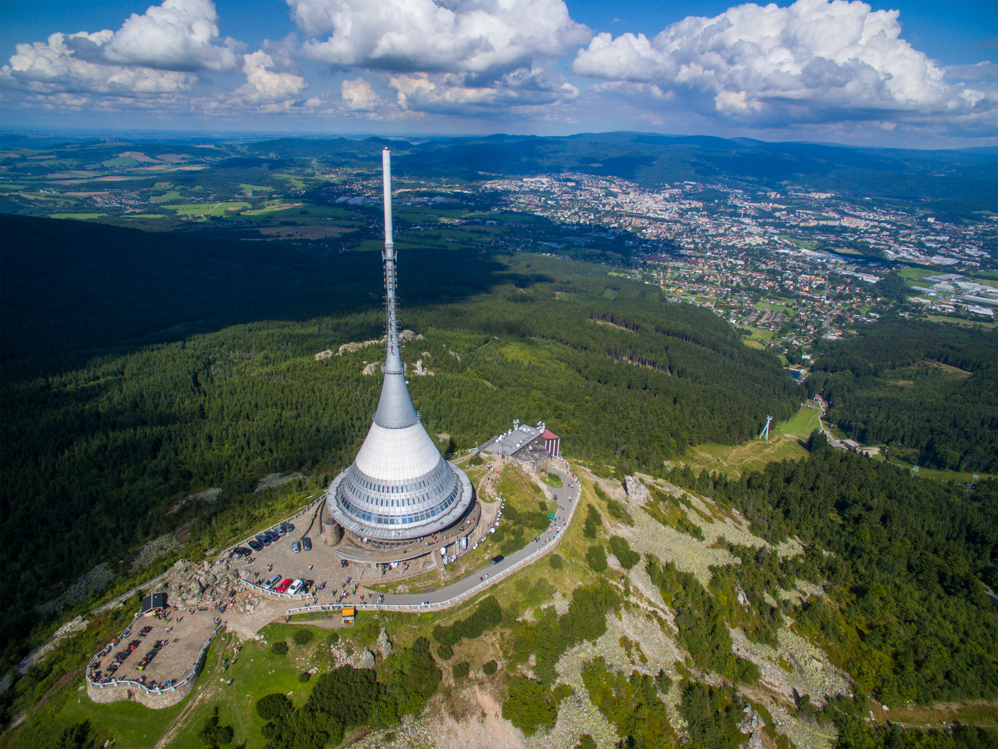 Pohled na Ještěd s Libercem